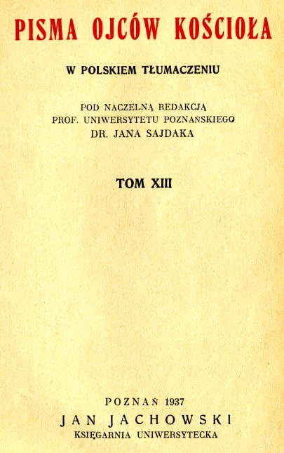 Strona tytułowa książki "Pisma ojców kościoła", tom XIII, wyd. Jan Jachowski, Księgarnia Uniwersytecka, Poznań 1937